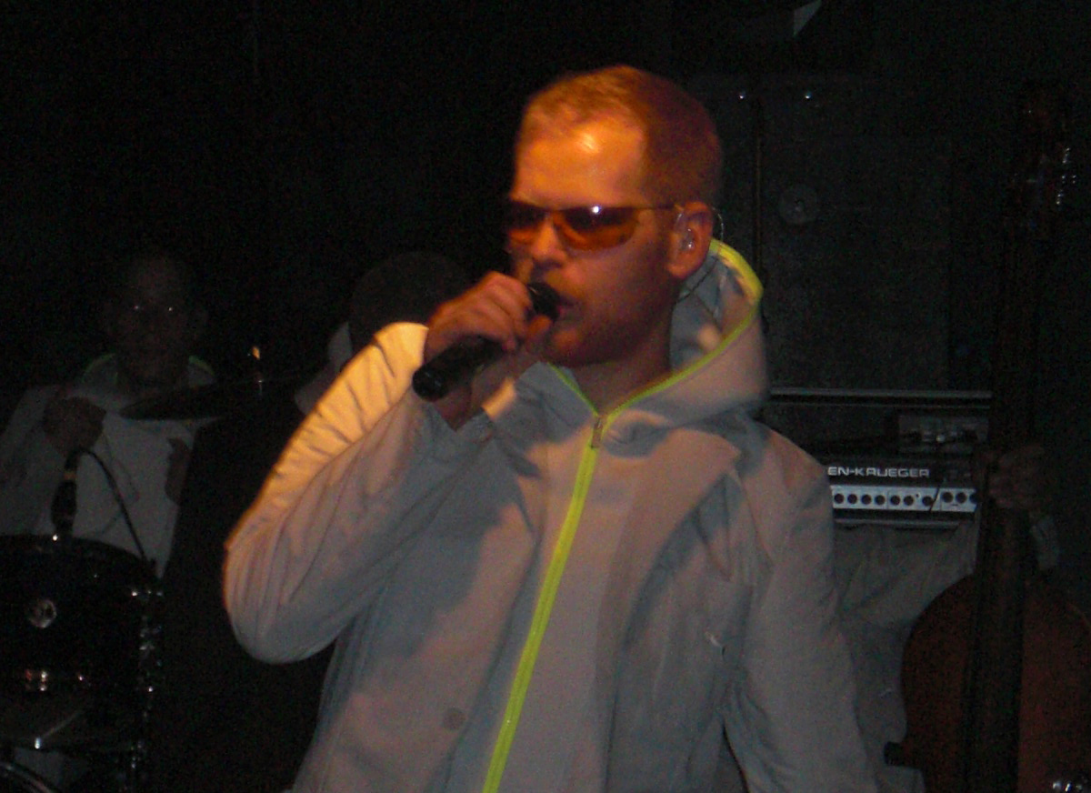 Peter Fox beim Myspace Secret Gig im Ostwerk in Augsburg